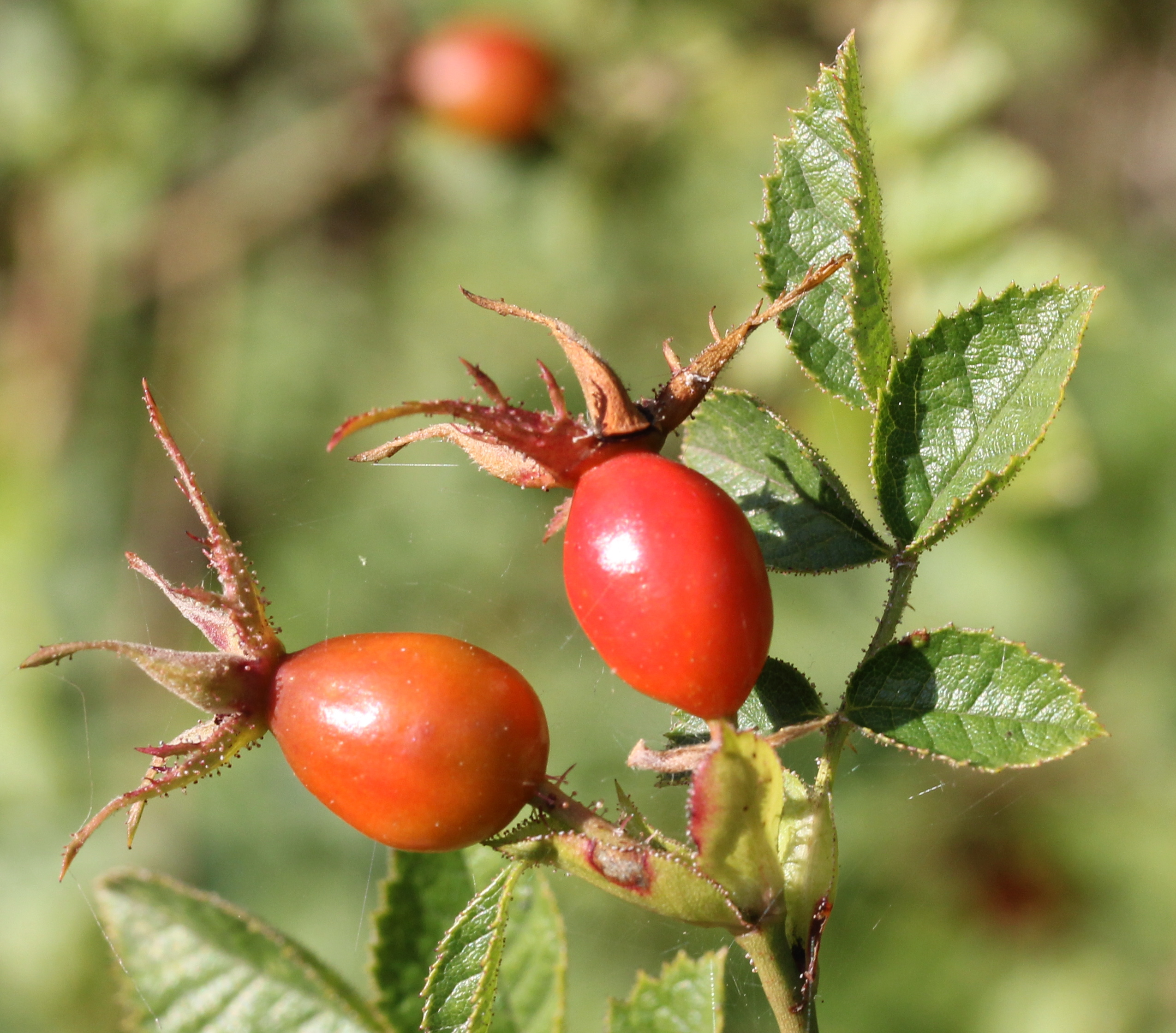 Rosa rubiginosa